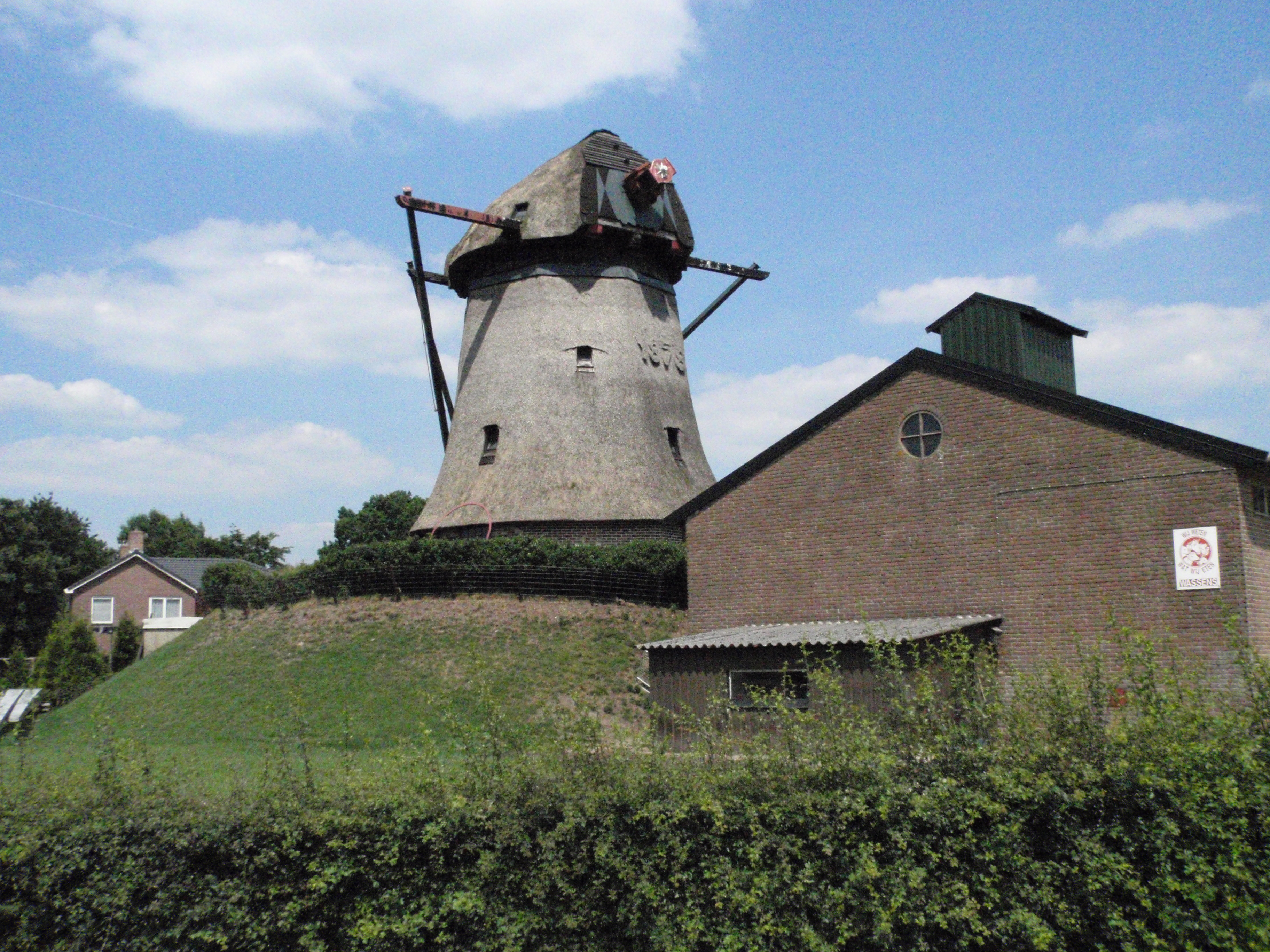 Molen De Vlijt te Zuidwolde